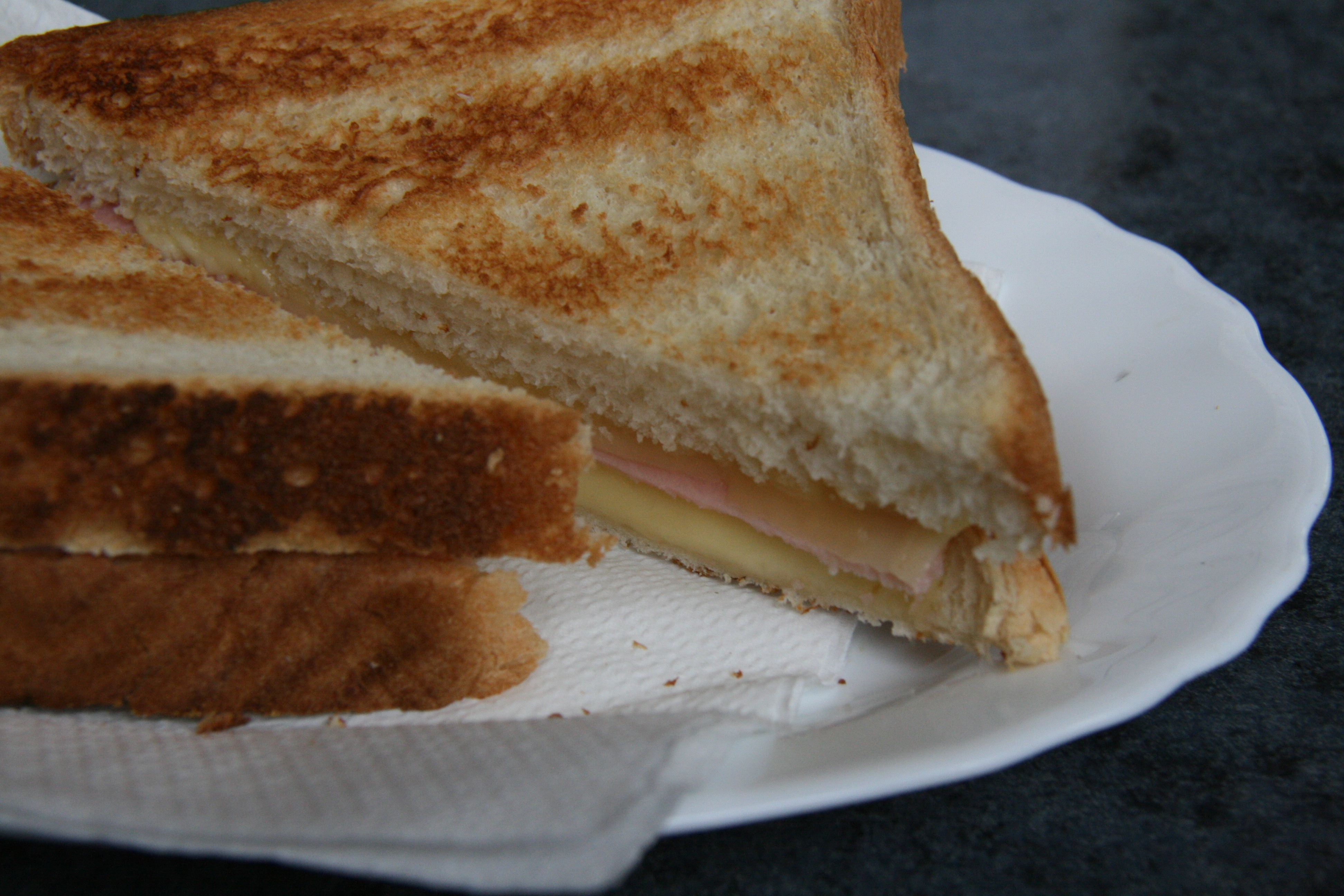 Detalle de un sandwich mixto